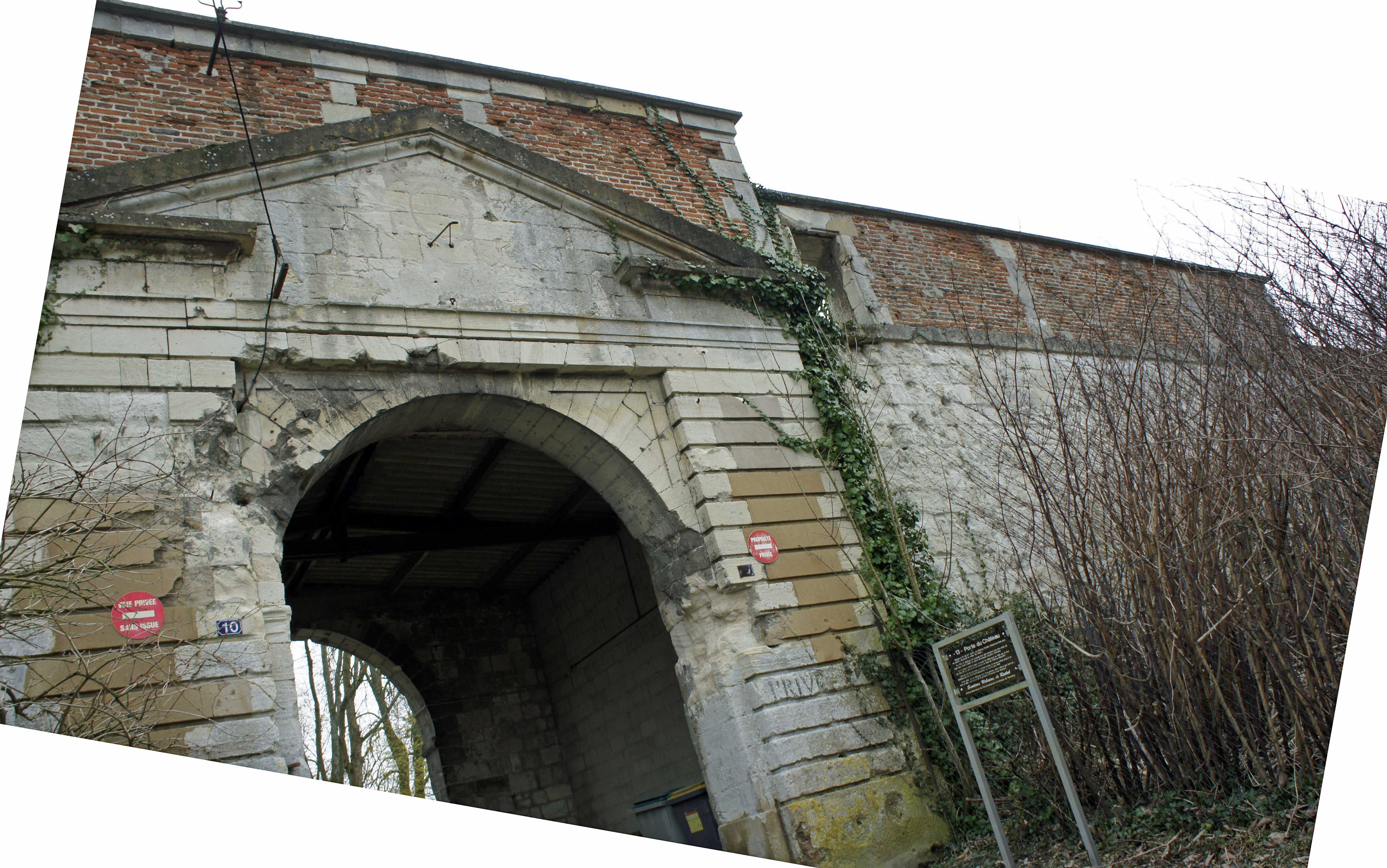 La Porte, vers la ville, du château de Rethel.